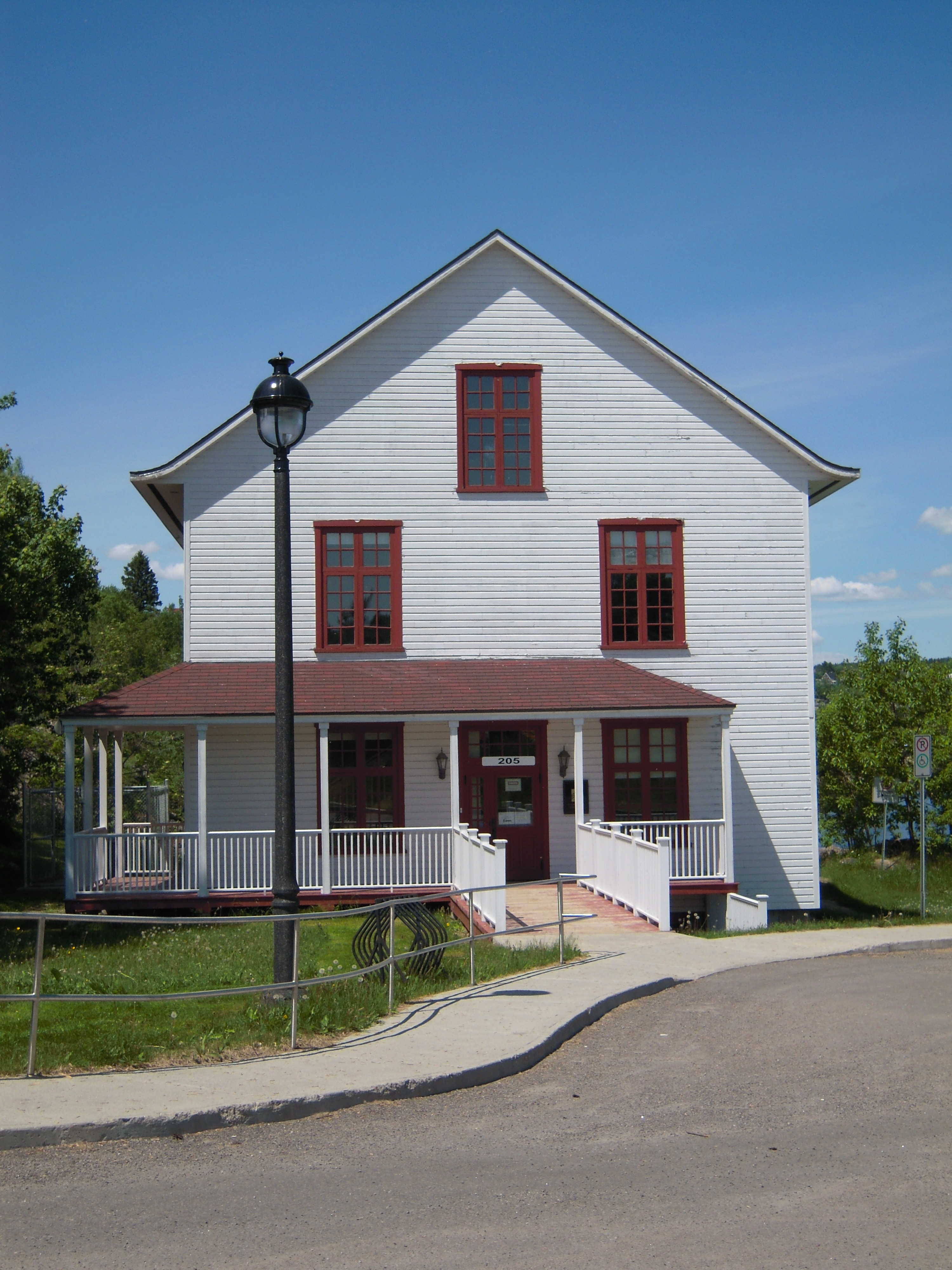 Le Moulin à eau Riverin à Saguenay construit en 1870.